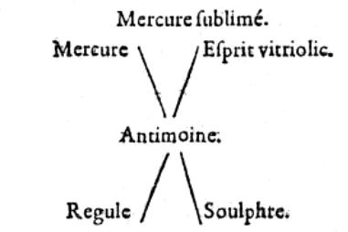 Schéma de réaction de Jean Béguin